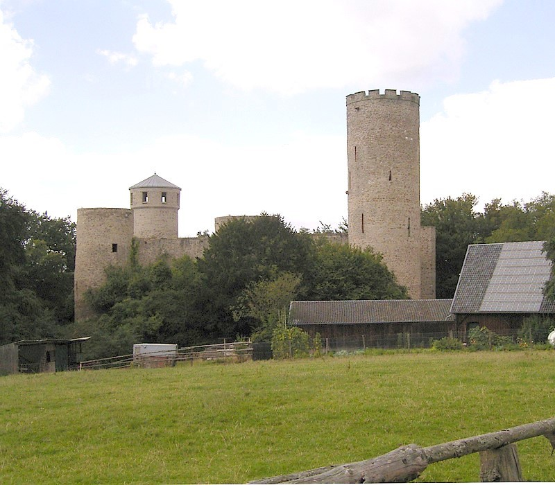 Laufenburg in Langerwehe